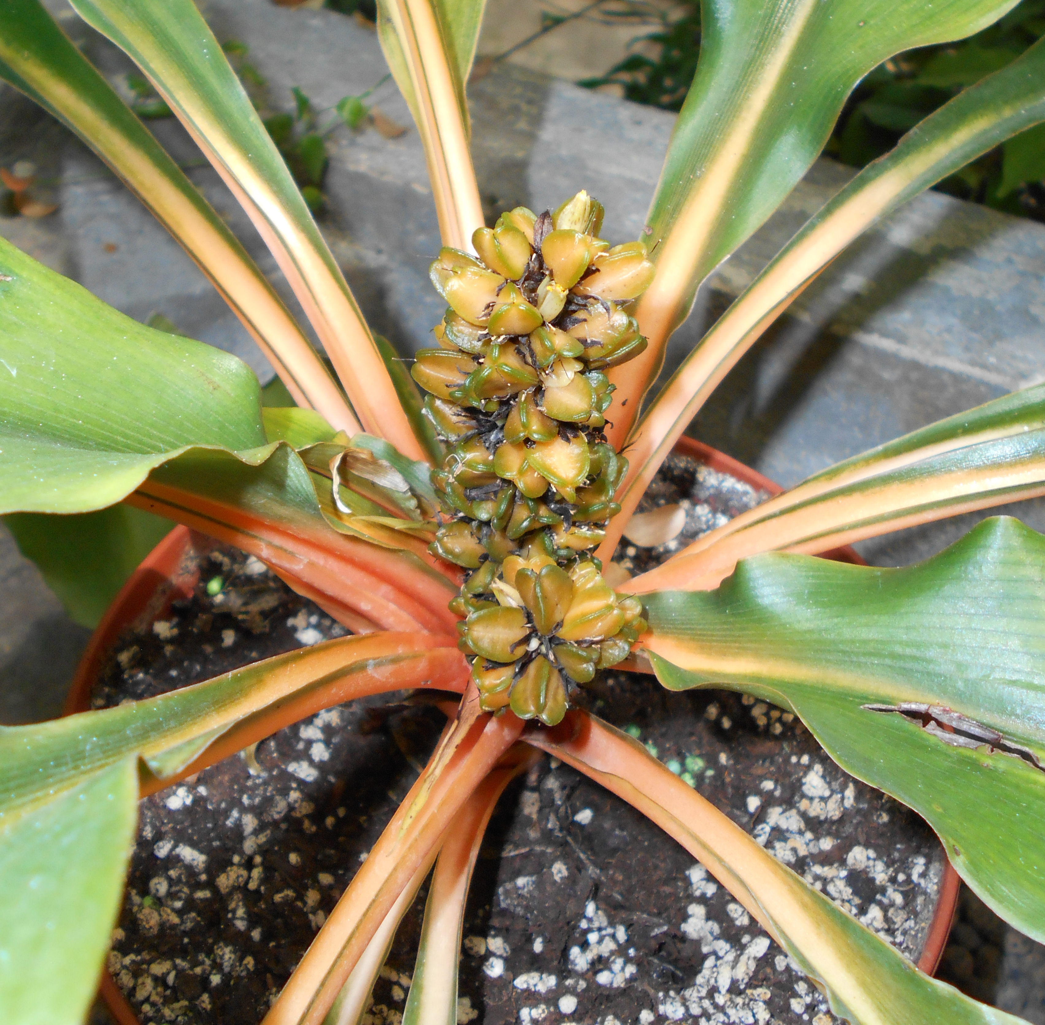 Zielistka pomarańczowa (Chlorophytum orchidastrum). Ogród Botaniczny UMCS, Lublin.